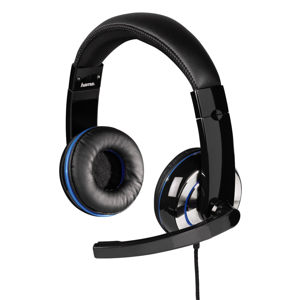 PS4-Headset